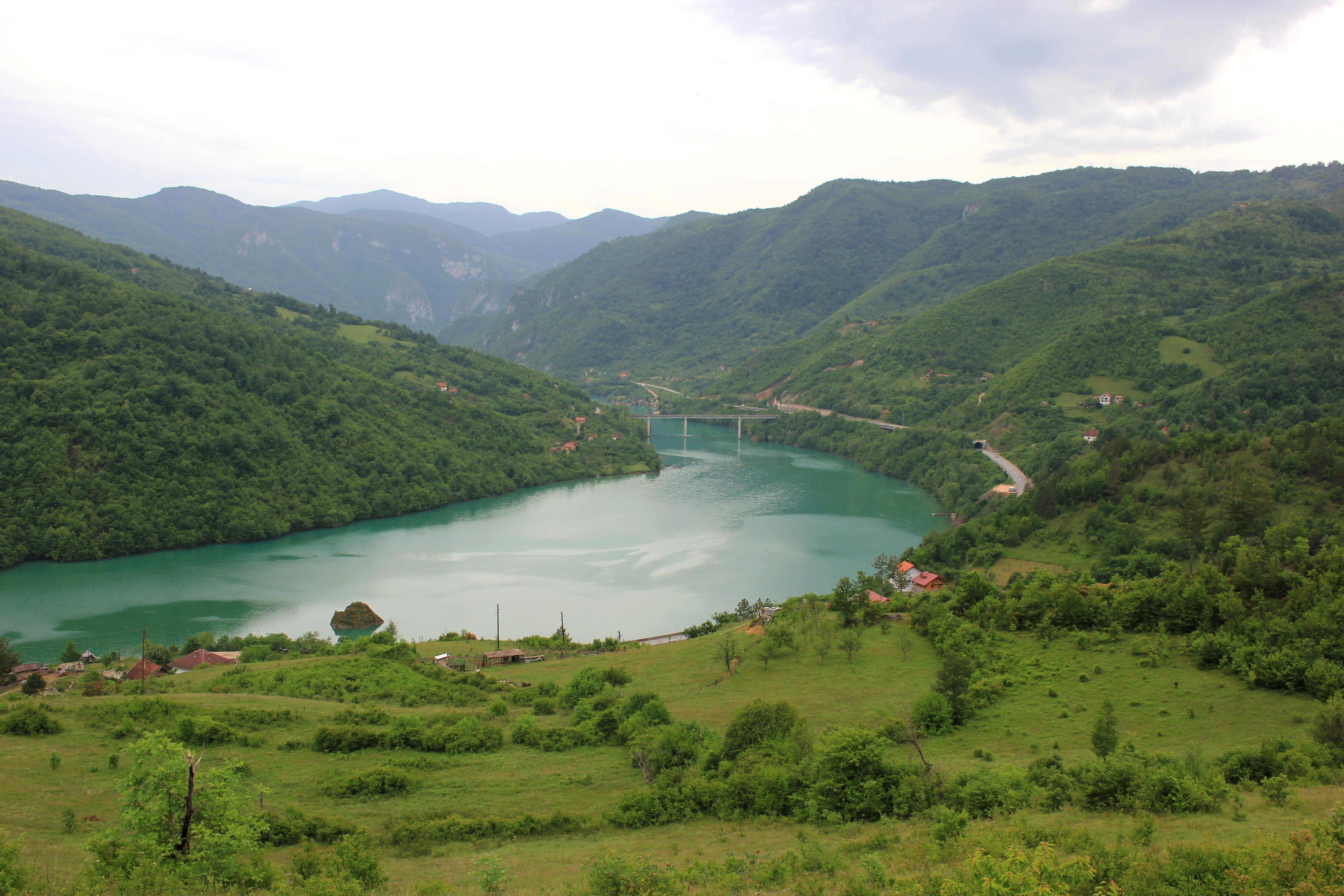 Blick auf die Drina oberhalb von Međeđa, Bosnien